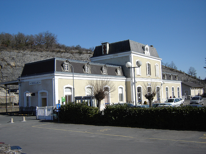 Gare de Souillac (Lot), France